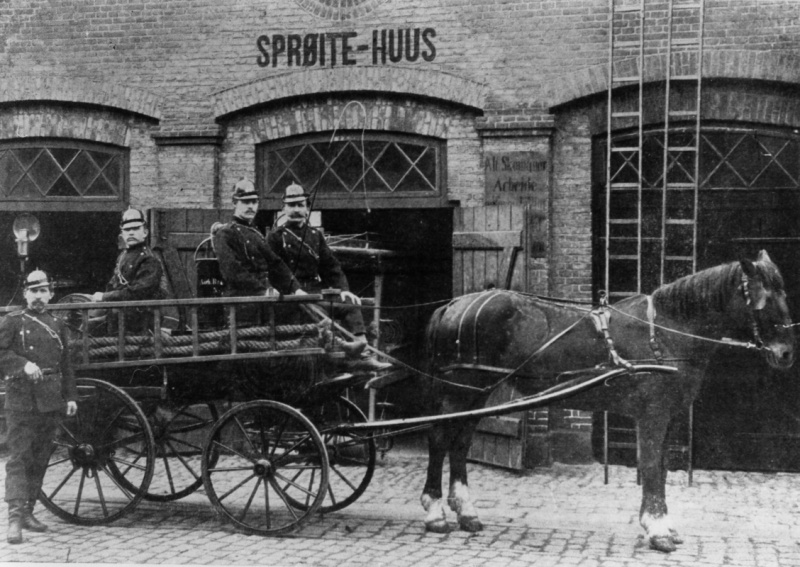 Sprøjtehuset i Aagade i Aarhus